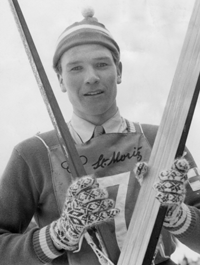 Хейкки Хасу, финский лыжник